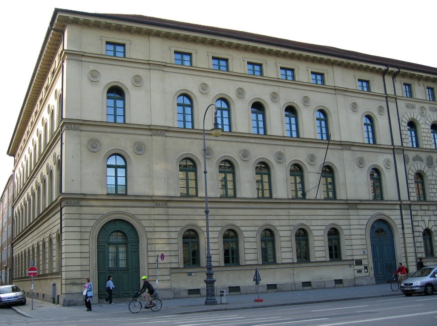 Gebäude des Landessozialgerichtes, Ludwigstraße 15 in München (Bayern)